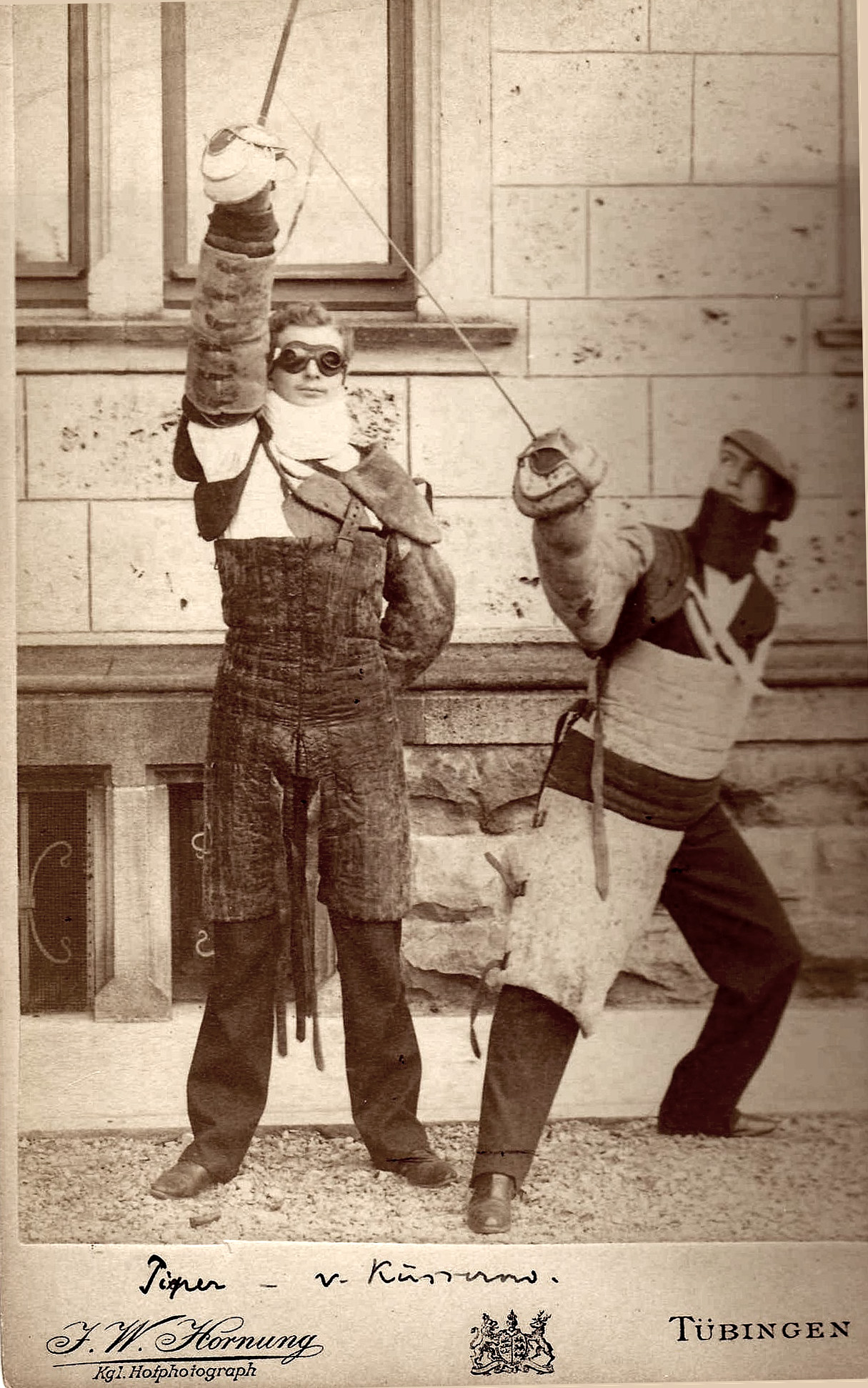 Mensur beim Corps Rhenania in Tübingen